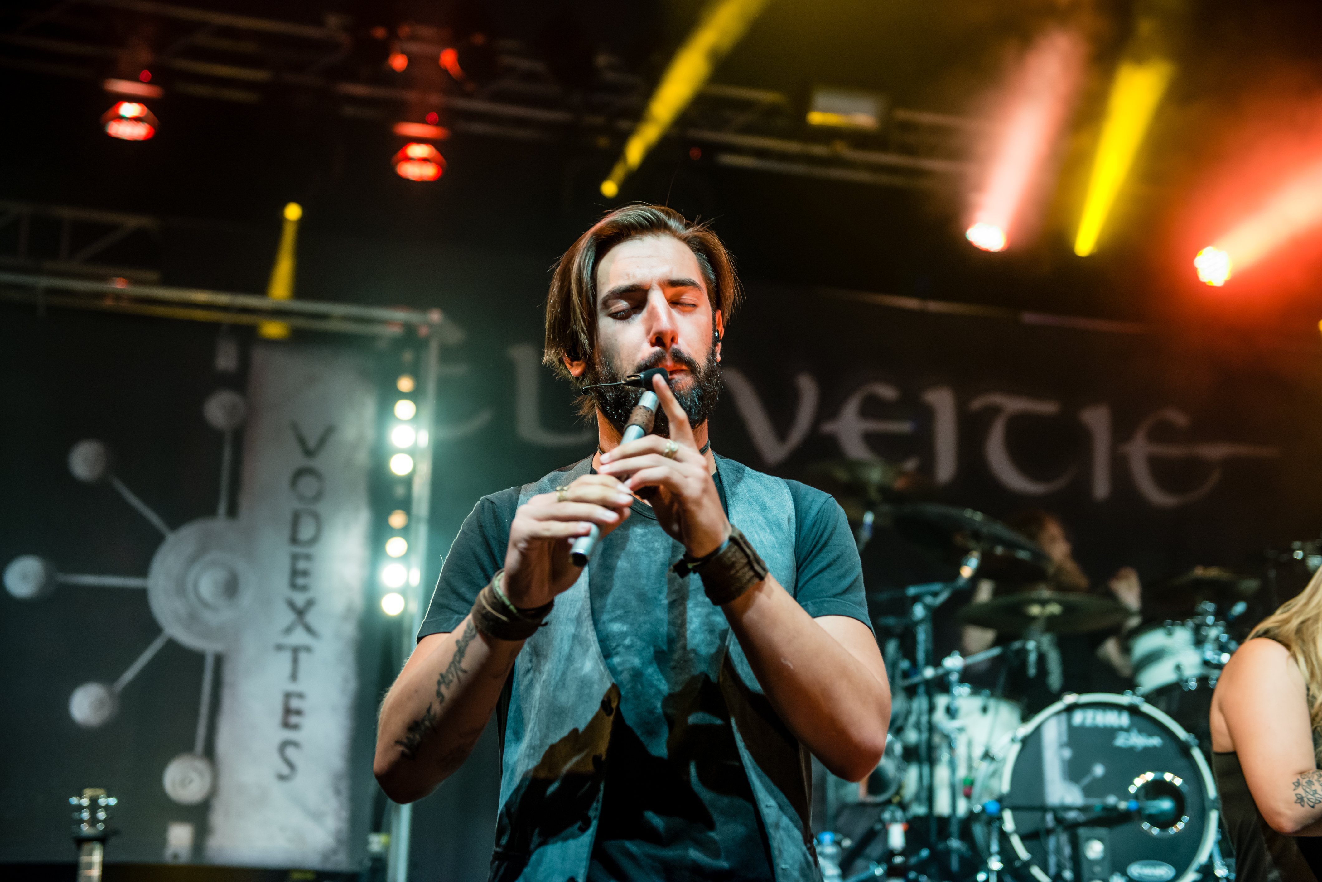 'Dong Open Air 2015; Neukirchen-Vluyn Halde Norddeutschland': 'Eluveitie'